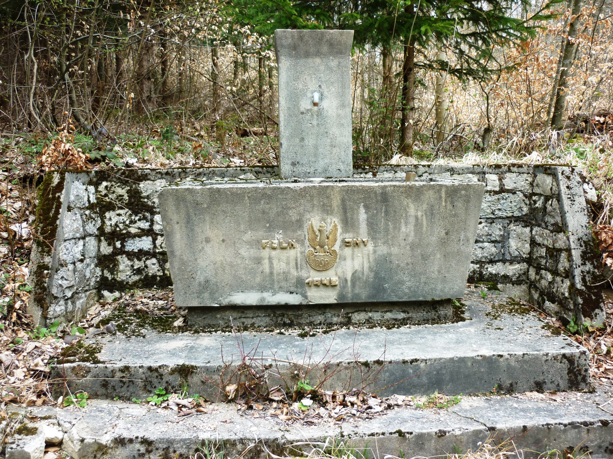 Brunnen am Polenweg, Geissberg AG, Schweiz